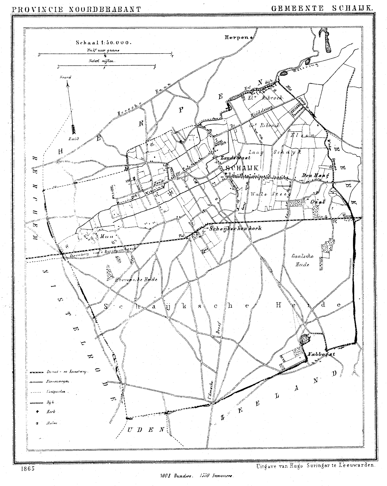 Nederland, Noord-Brabant, Gemeente Schaijk